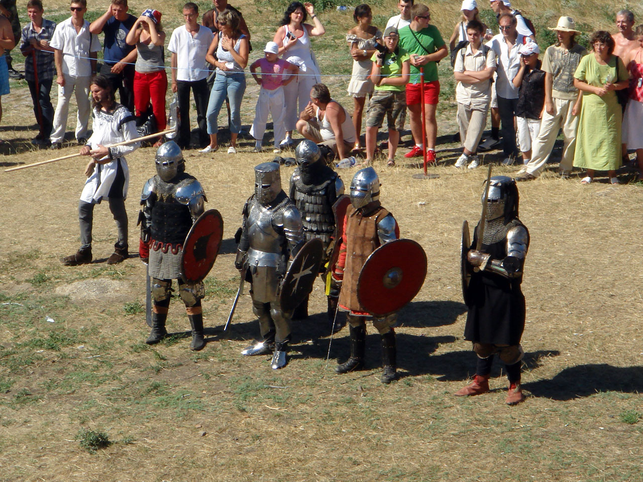 Командный рыцарский поединок. Россия против Одессы.